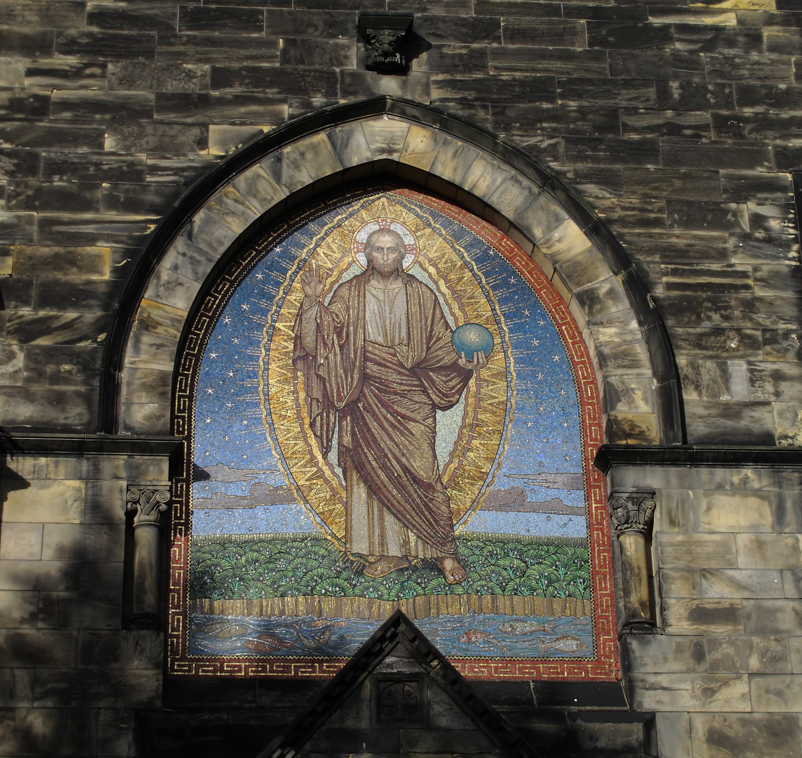 Markuskirche in Hannover: Mosaik auf der Südwestseite